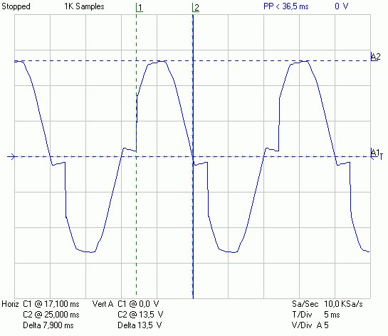 Phasenanschnittssteuerung Ozilloskopbild